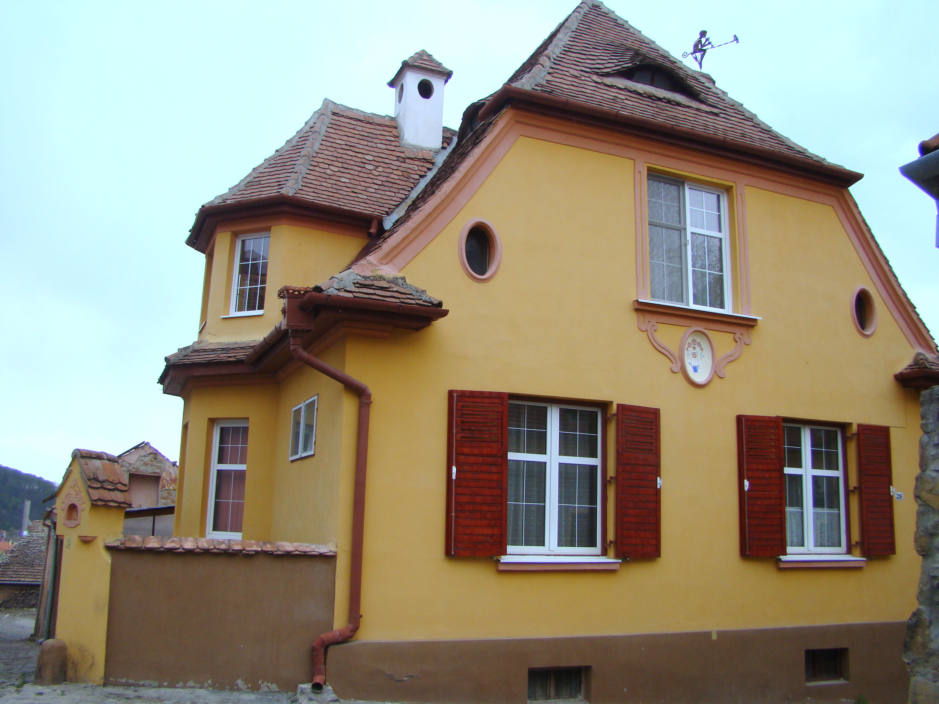 Casă, municipiul Sighișoara, str. Tâmplarilor 26 sec. XIX, 1910 - 1911